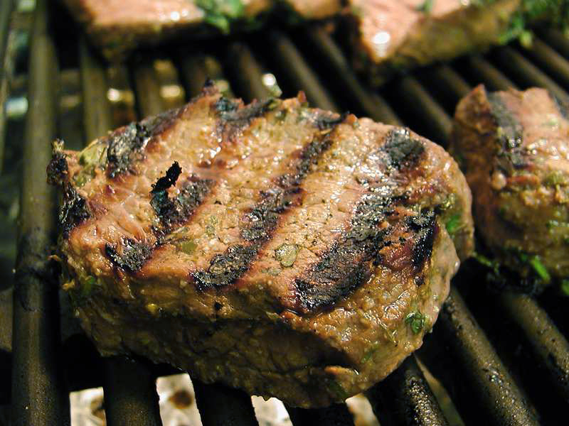 Steak auf einem Grill